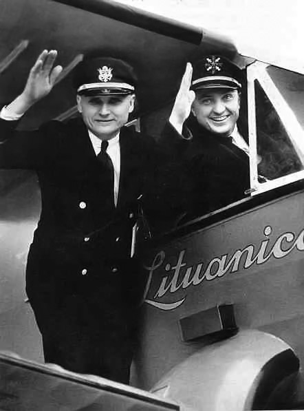 Дарюс в "Литуанике" и Гиренас рядом с кабиной перед трансатлантическим перелётом в июле 1933г.